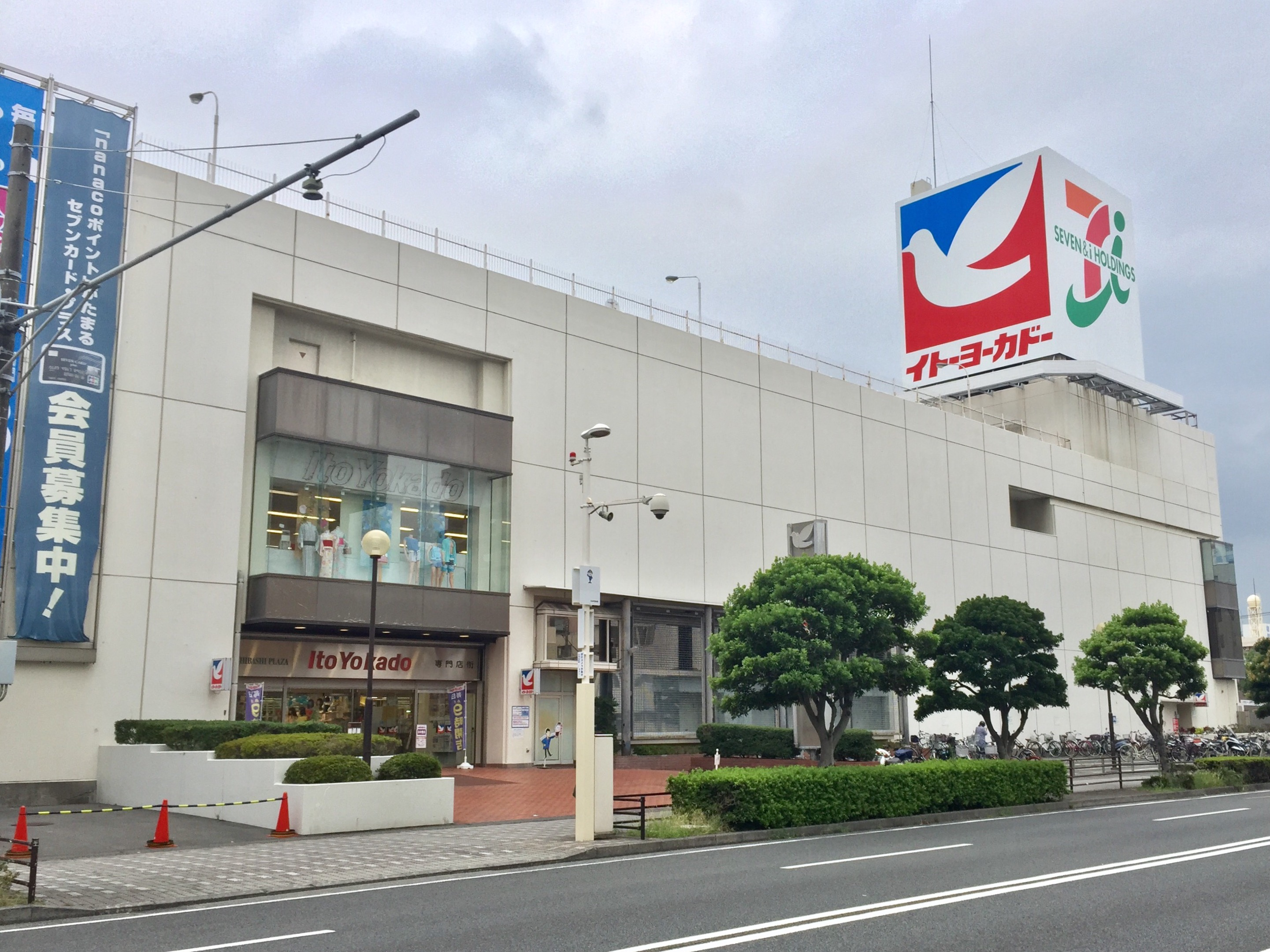 イトーヨーカドー沼津店。「鳩のマーク」復活店舗の一つ（※2017年より看板のメンテナンス時などに順次実施されている）。なお、看板の全面を変更するわけではなく、「鳩のマーク」と「セブン&アイ・ホールディングスのマーク」が2面ずつとなっている。